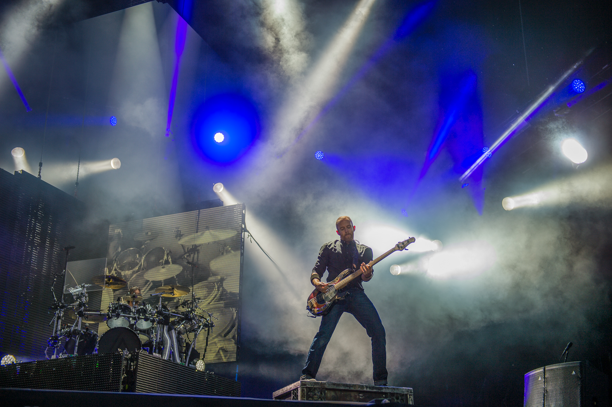 ARGO-Konzerte,Centerstage,Dave "Phoenix" Farrell,David „Phoenix“ Farrell,Konzert,Linkin Park,Livekonzert,Livemusik,Musik,RiP,Rock im Park 2014